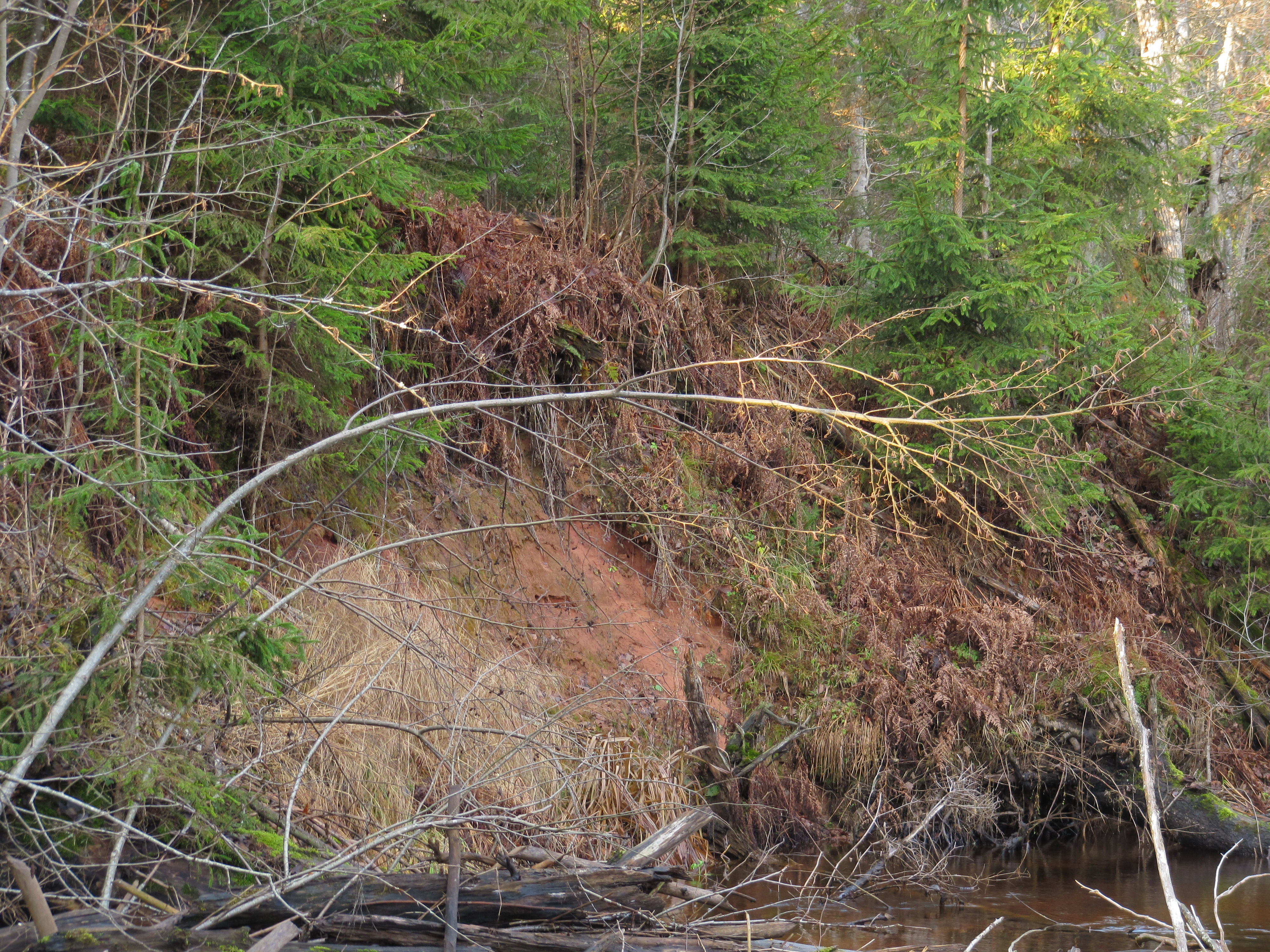 Pikamatsi paljand Lüütre oja vasakul kaldal, Kapa oja suubumiskohal Lüütre ojja. (Pikamatsi veskist üleval pool)